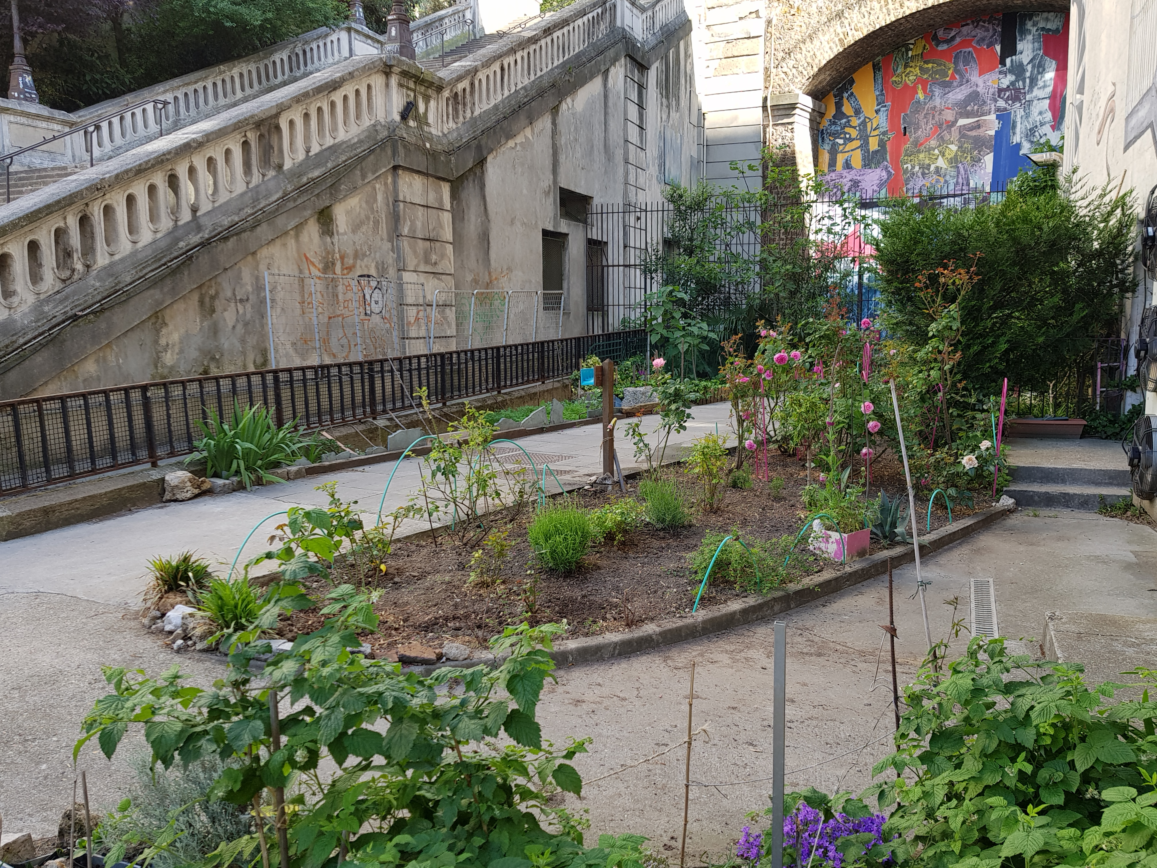 "Jardin des habitants", rue de la Manutention, Paris 16e.